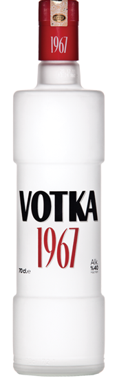 Votka 1967 Main Bottle